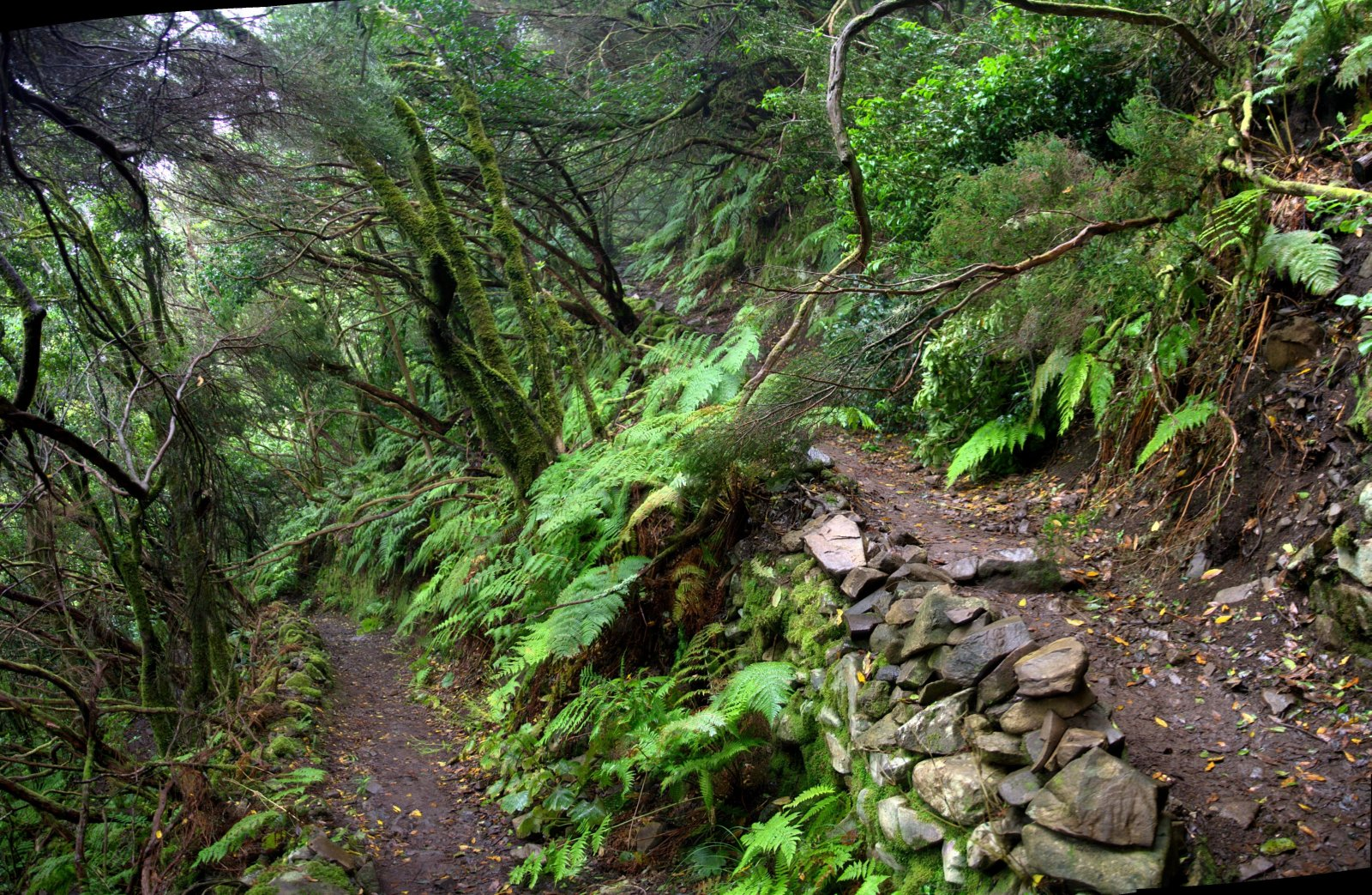 Camino de las Vueltas